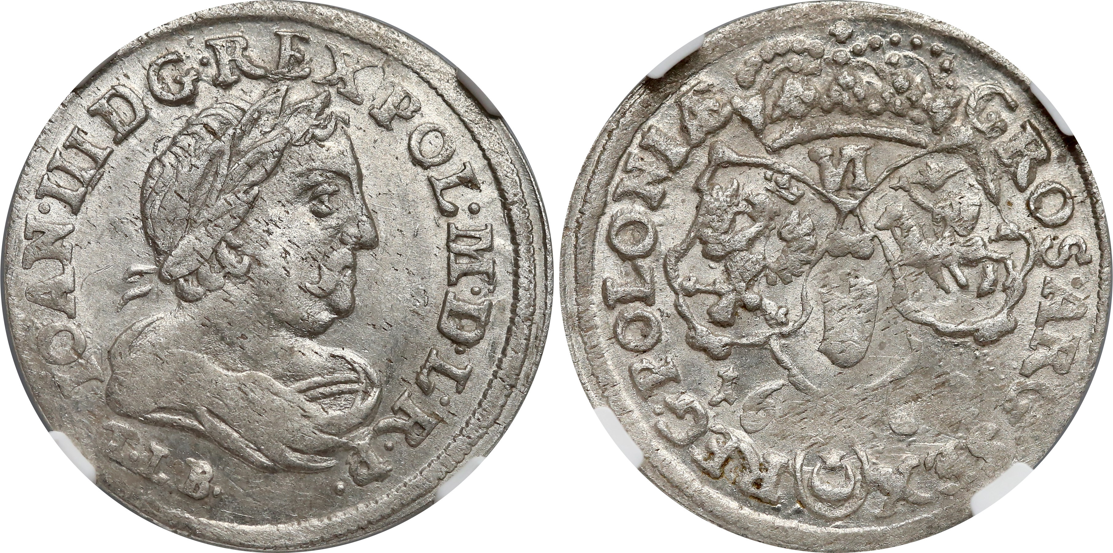 Szóstak koronny 1682 Bydgoszcz